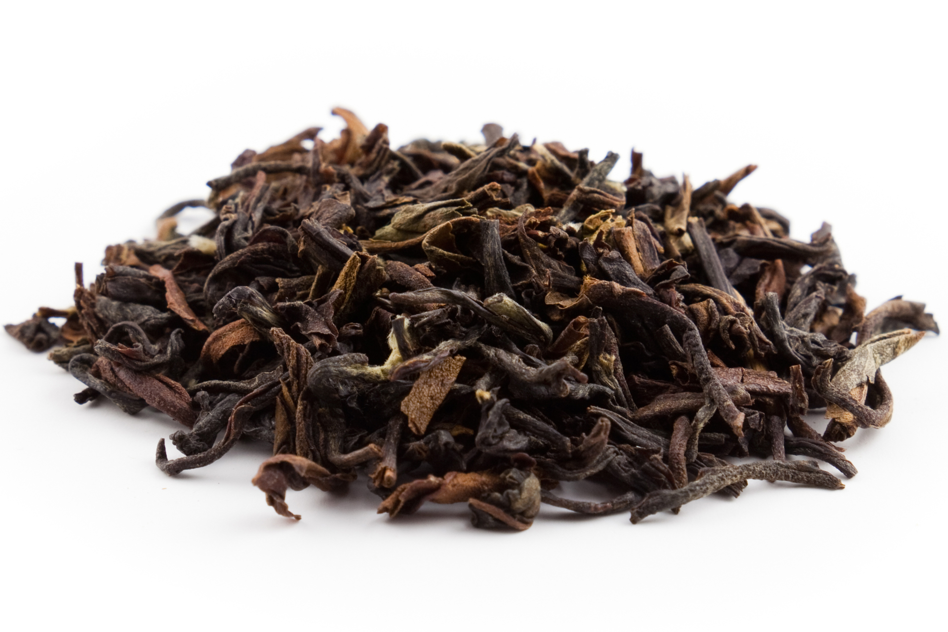 Schwarzer Tee Darjeeling (Second Flush)